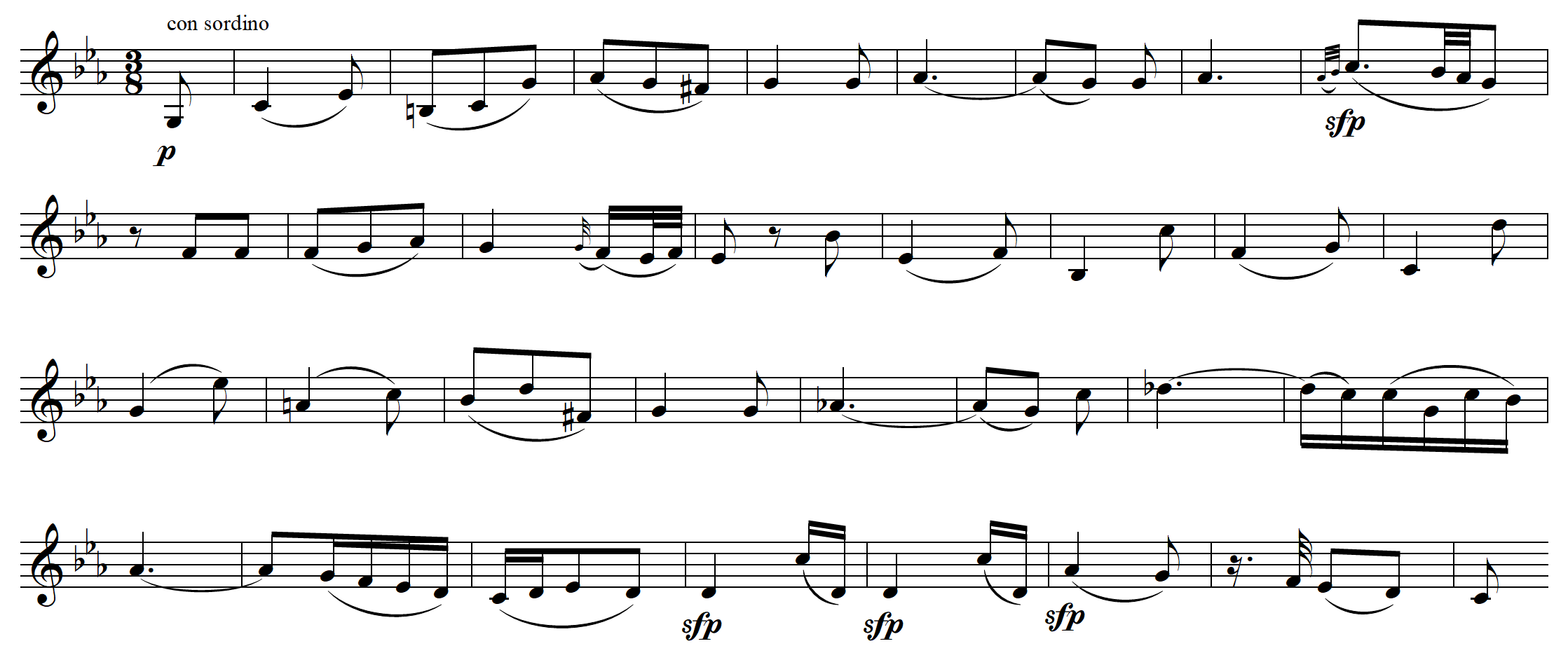 Notendatei der Melodie des Hauptthemas von Mozarts Klavierkonzert Nr. 22, 2. Satz